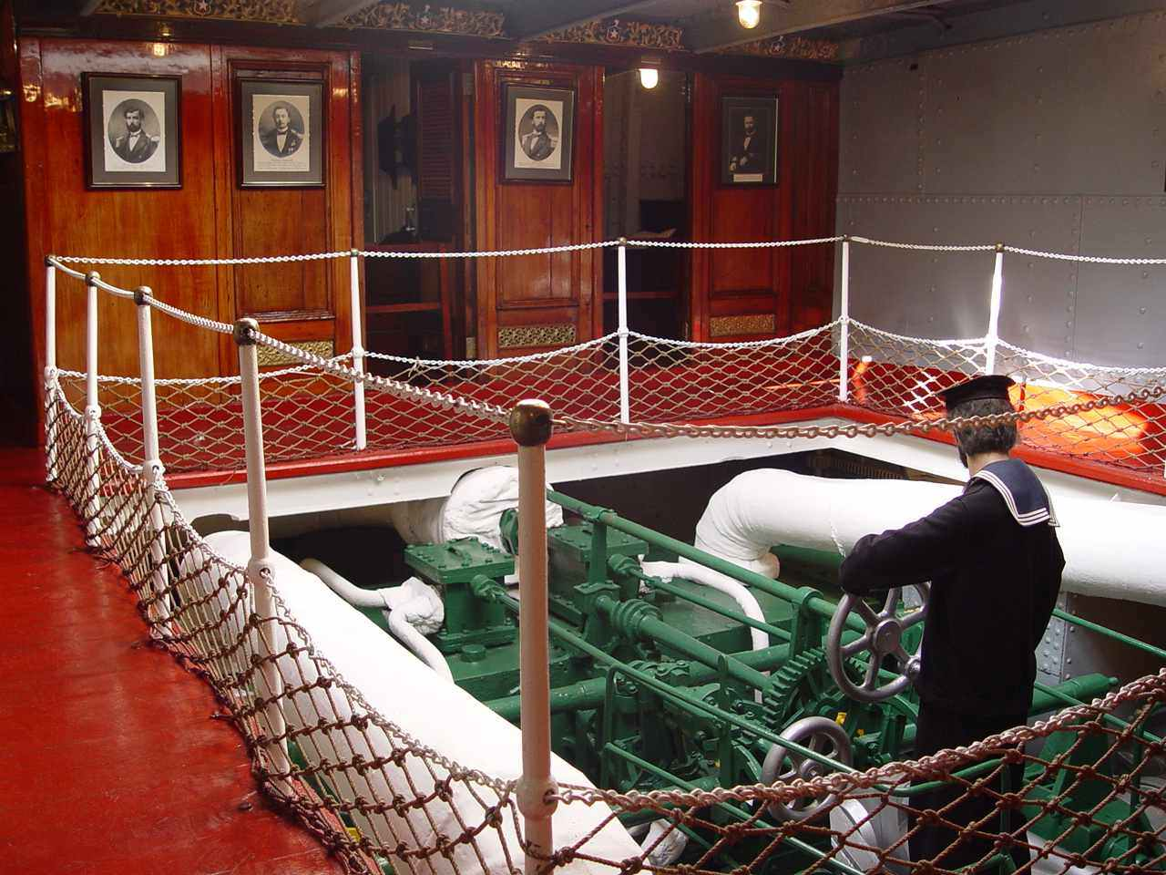 Sala de máquinas del monitor Huáscar